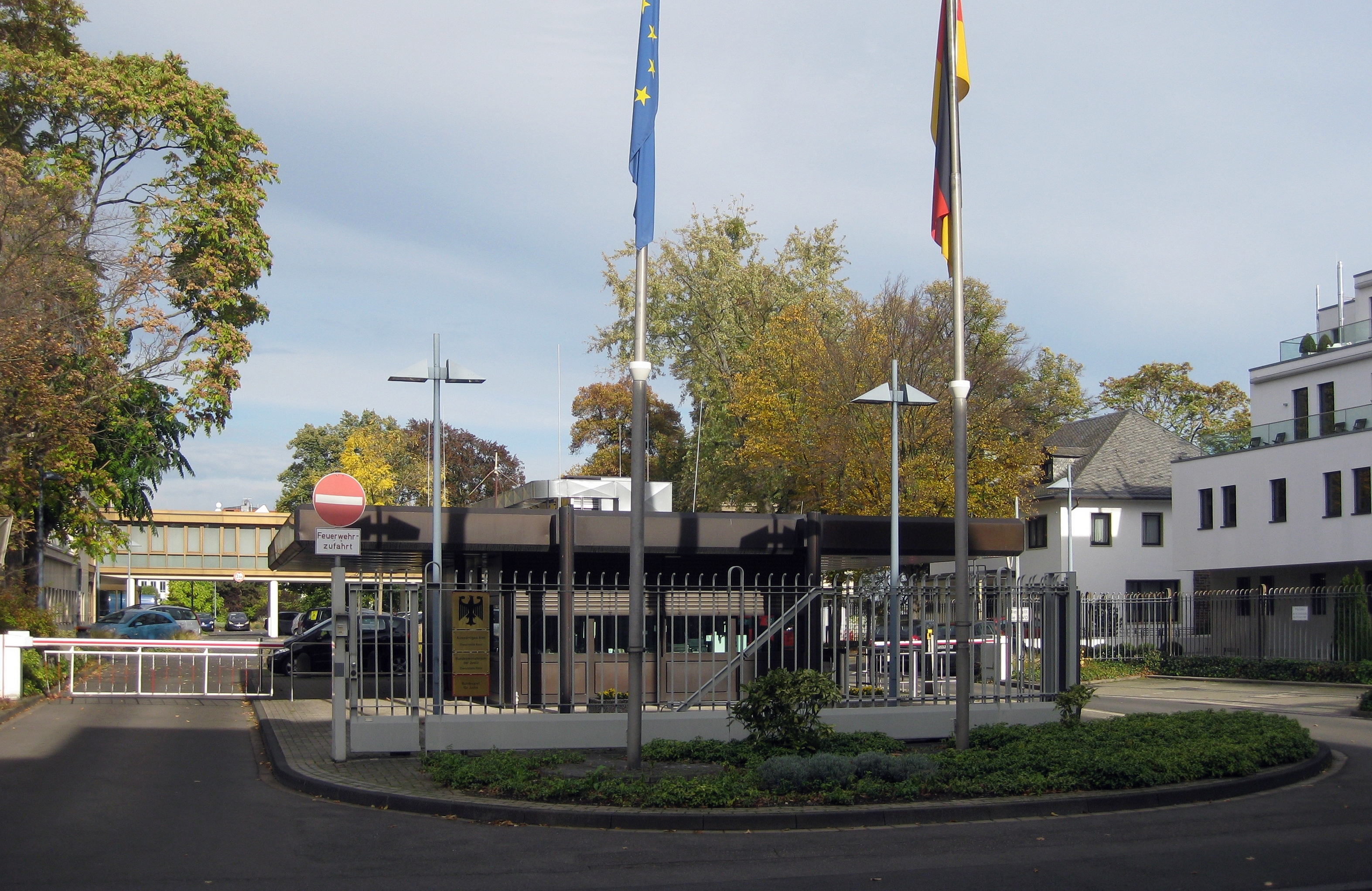 Einfahrt Tempelstraße zum Auswärtigen Amt (Dienstsitz Bonn), Bundesministerium der Justiz (Dienststelle Bonn), Bundesamt für Justiz